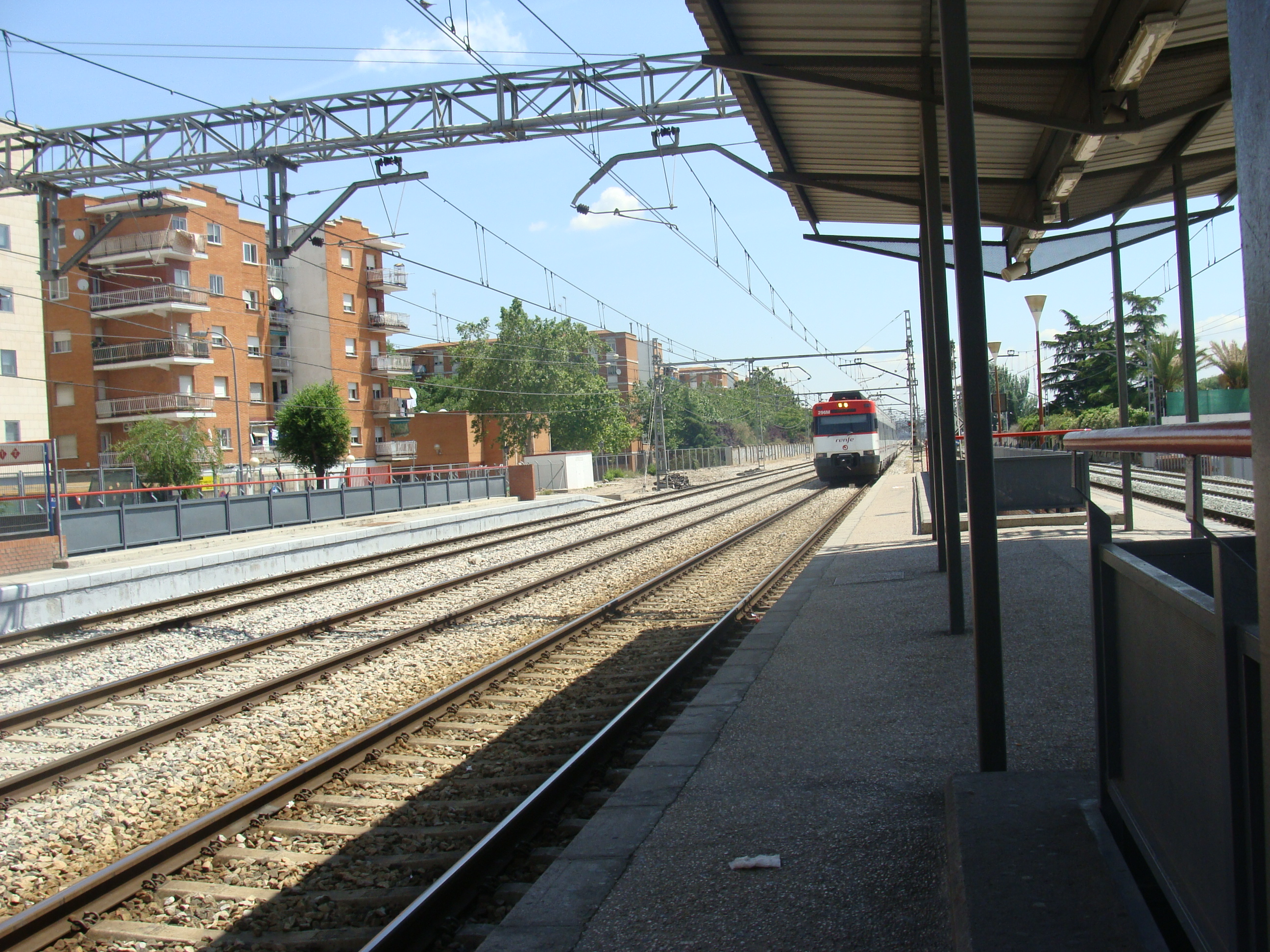 Vías y andenes de la estación de Torrejón de Ardoz.